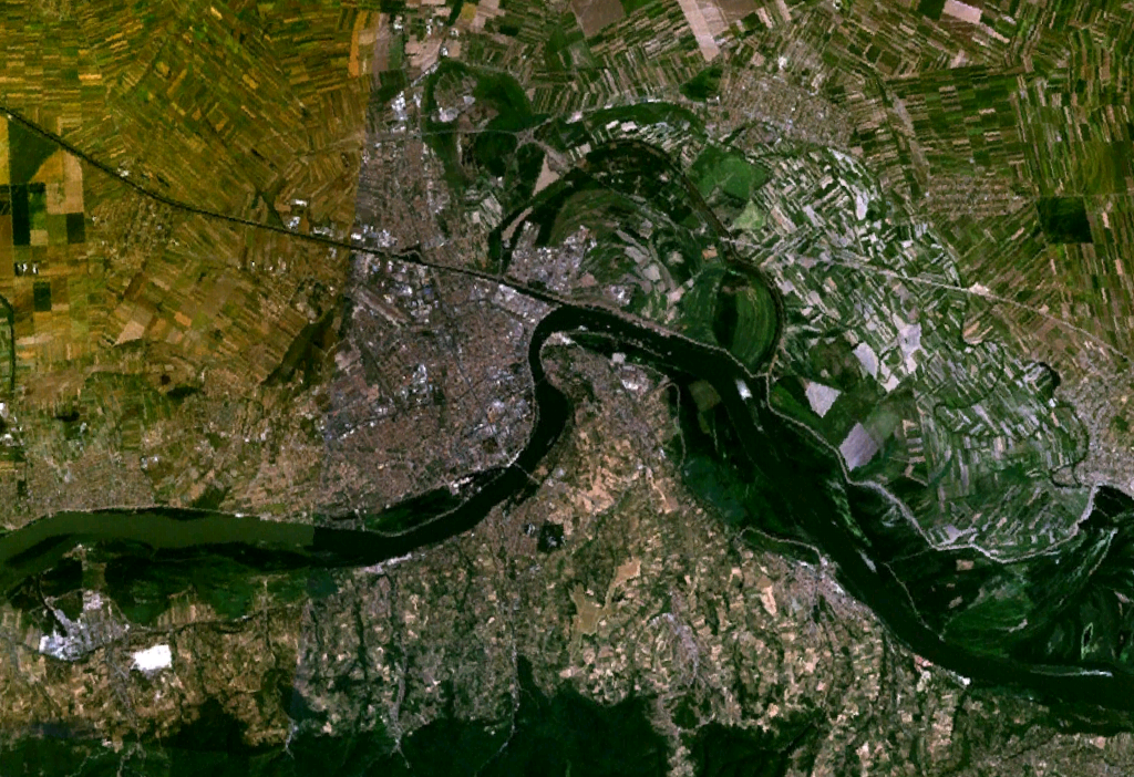 Satellite image showing urban and metro area of Novi Sad, Vojvodina (Serbia)/Image satellitaire de la ville de Novi Sad, Voïvodine (Serbie)